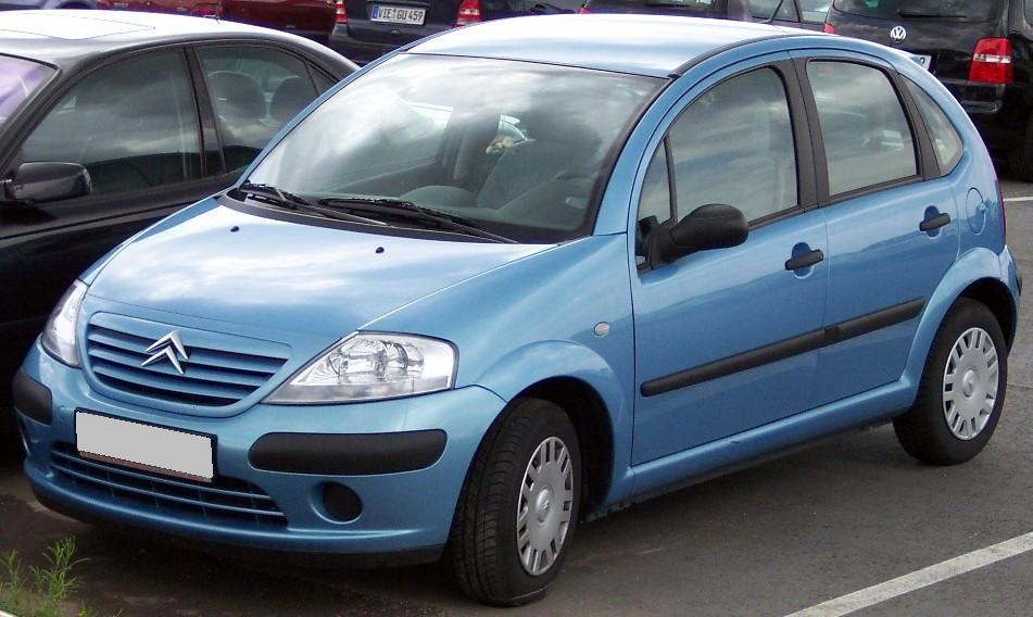 Citroen C3